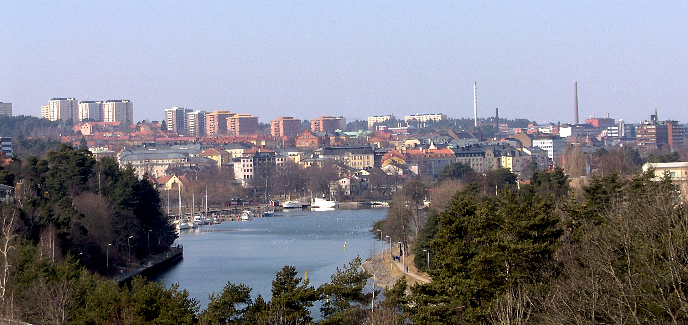 Södertälje från nya Saltsjöbron. Yttre Maren med gästhamn och den gamla ångbåten, Ejdern. På Bårstaberget syns höghusen. 2005. Södertälje from the new Saltsjöbron. Outher Maren with its guestharbour and the old steamship, Ejdern, still running. On the Bårsta hill are multiflat houses.